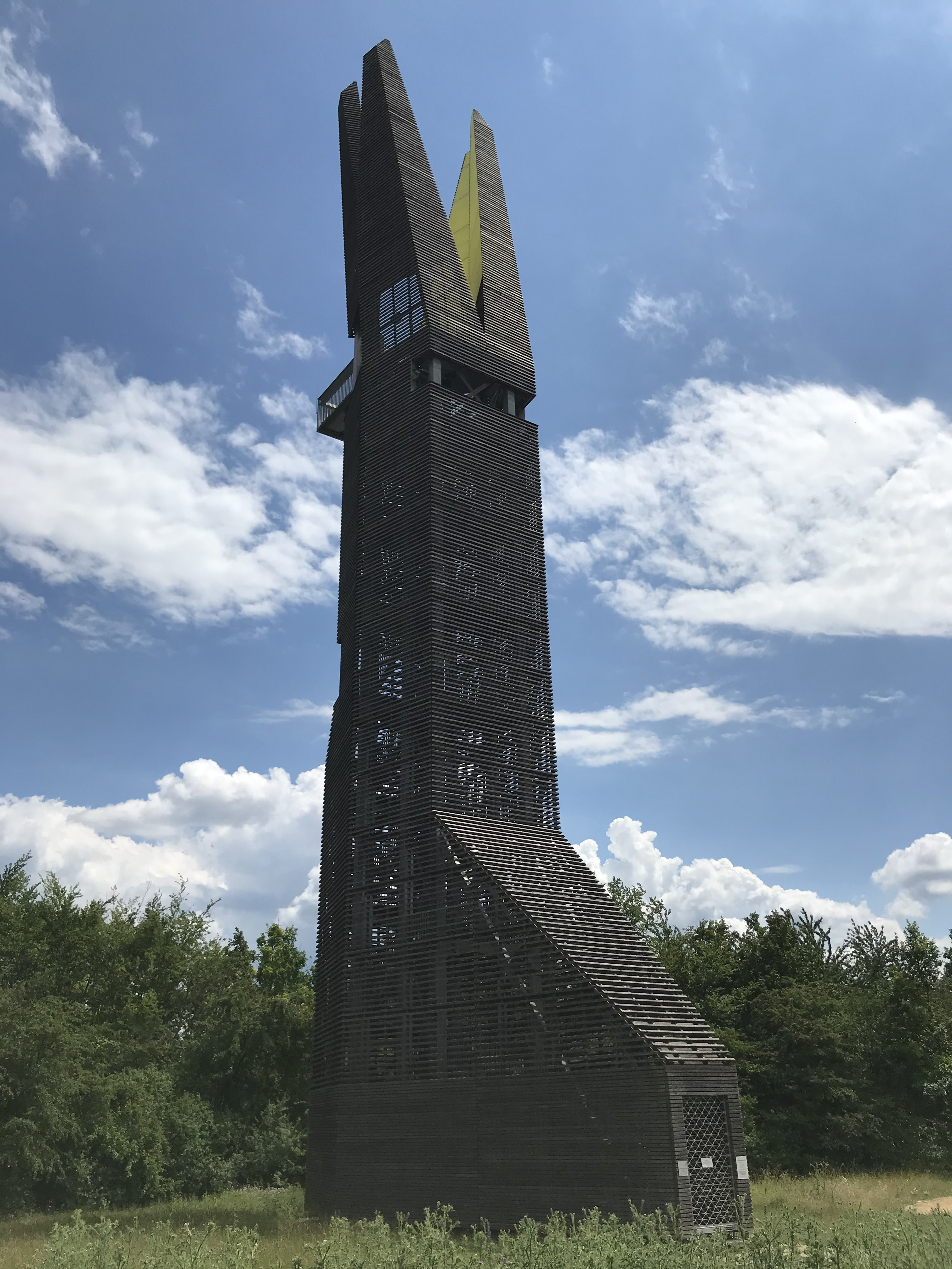 Regionalpark-Turm im Regionalparkportal an den Weilbacher Kiesgruben